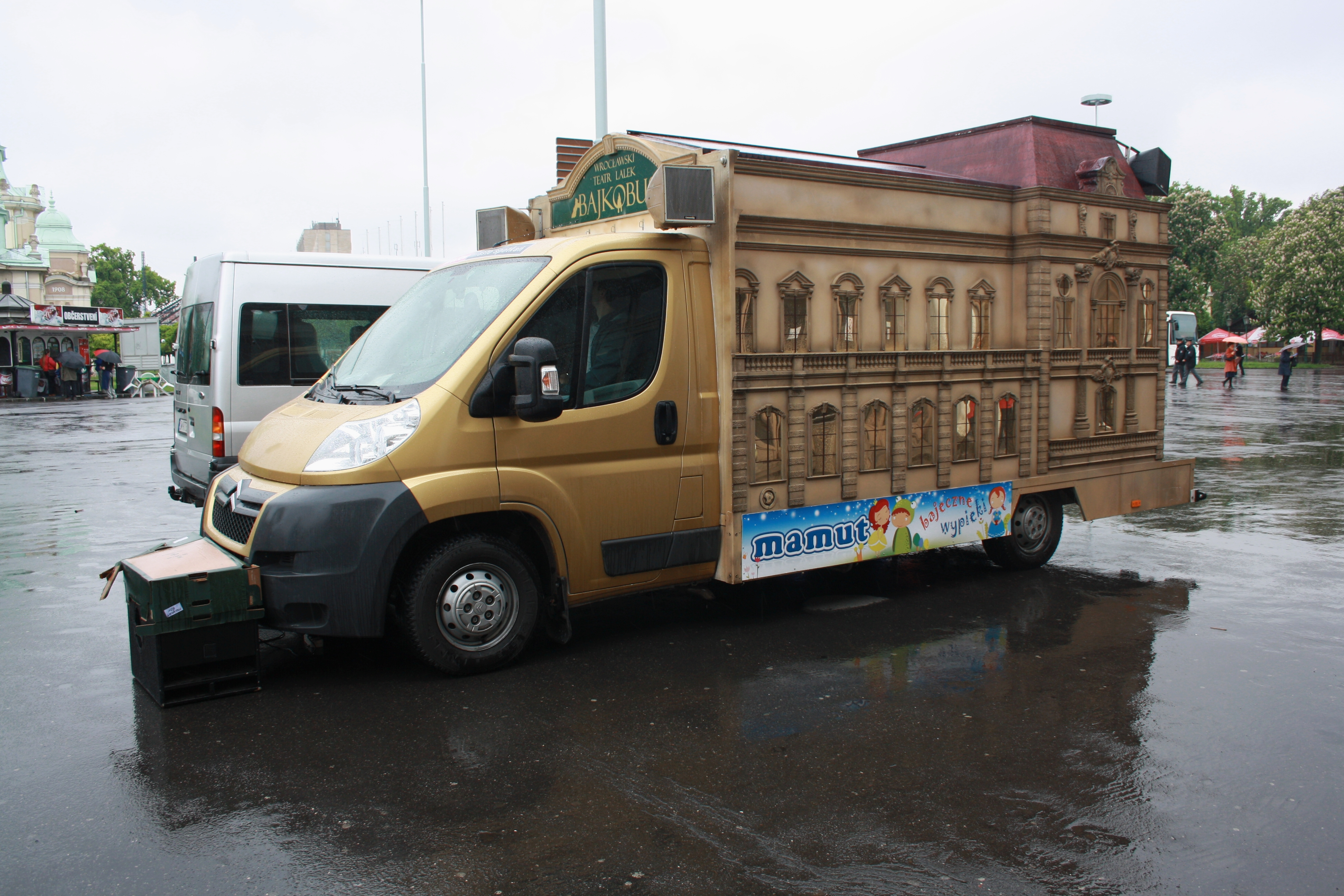 Svět knihy 2010 - Bajkobus This photograph was taken with a DSLR from WMCZ's Camera grant.